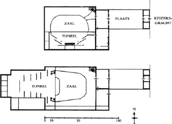 Plattegrond eerste en tweede schouwburg